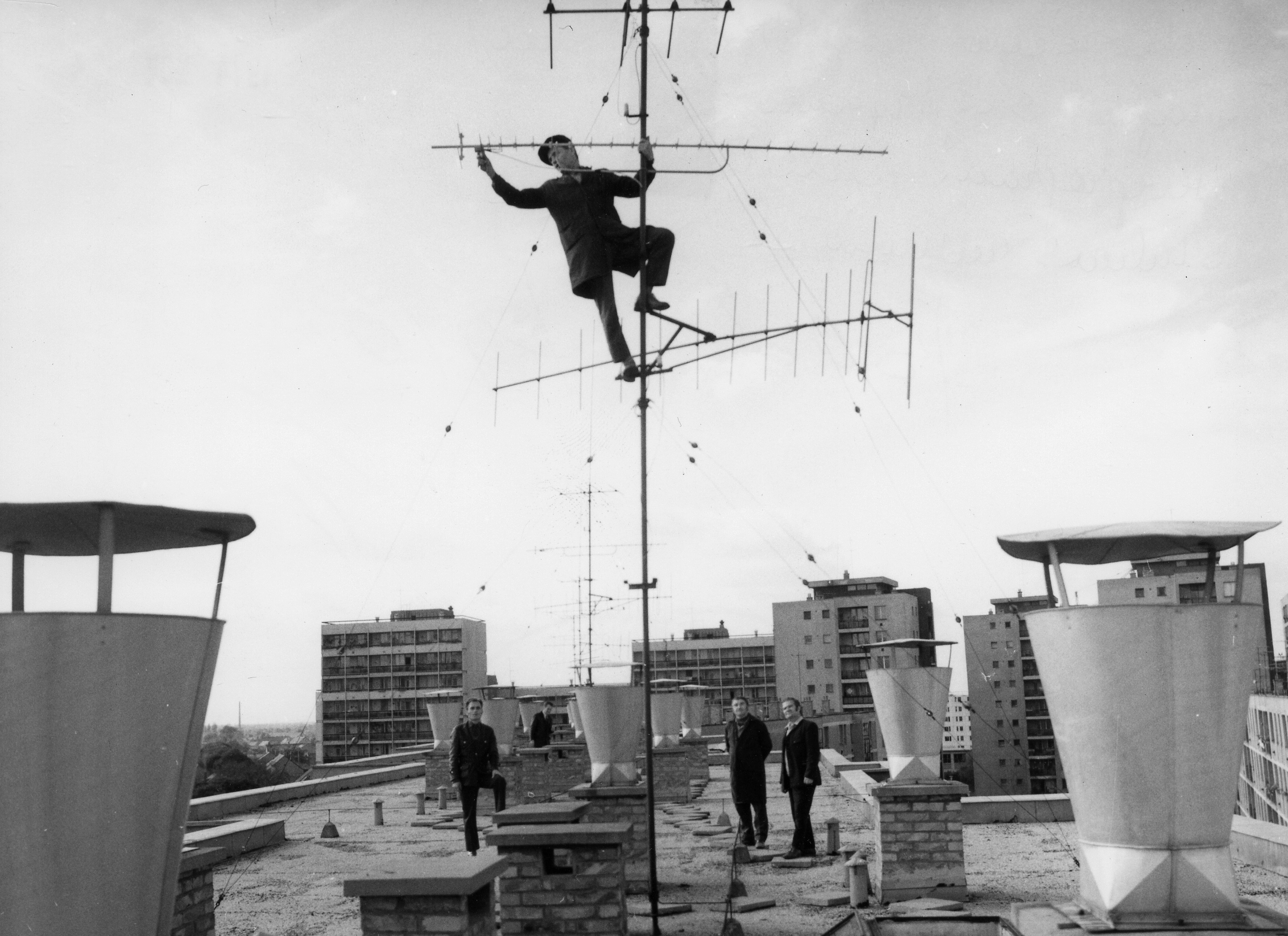 Szegfű utca 1. szerelik a Tokajból sugározandó 2. tévéprogram vételére alkalmas antennákat. Szemben a Viola utcai házak látszanak. Location: Hungary, Debrecen Title: Szegfű utca 1. szerelik a Tokajból sugározandó 2. tévéprogram vételére alkalmas antennákat. Szemben a Viola utcai házak látszanak.